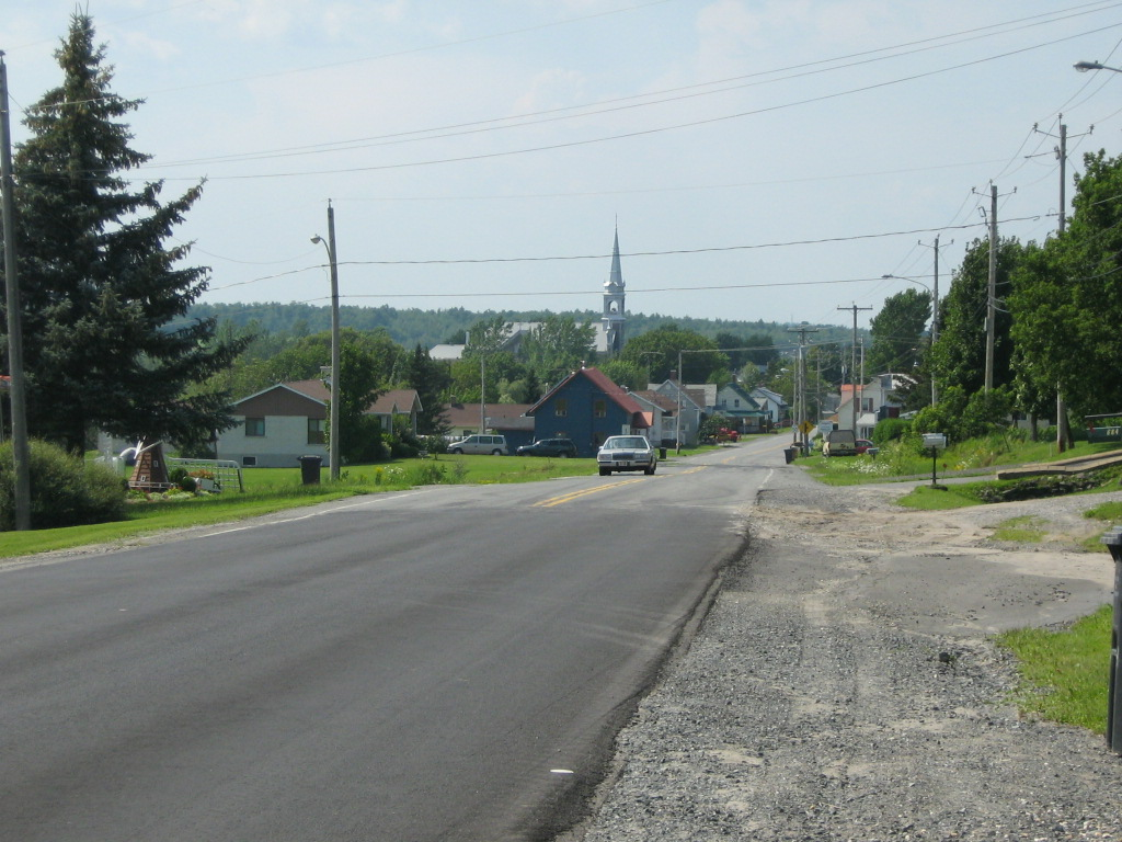 Village de L'Avenir au Québec, Canada.